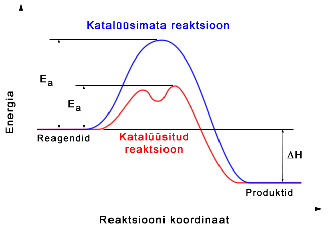 Katalüüsitud ja katalüüsimata reaktsiooni skeem